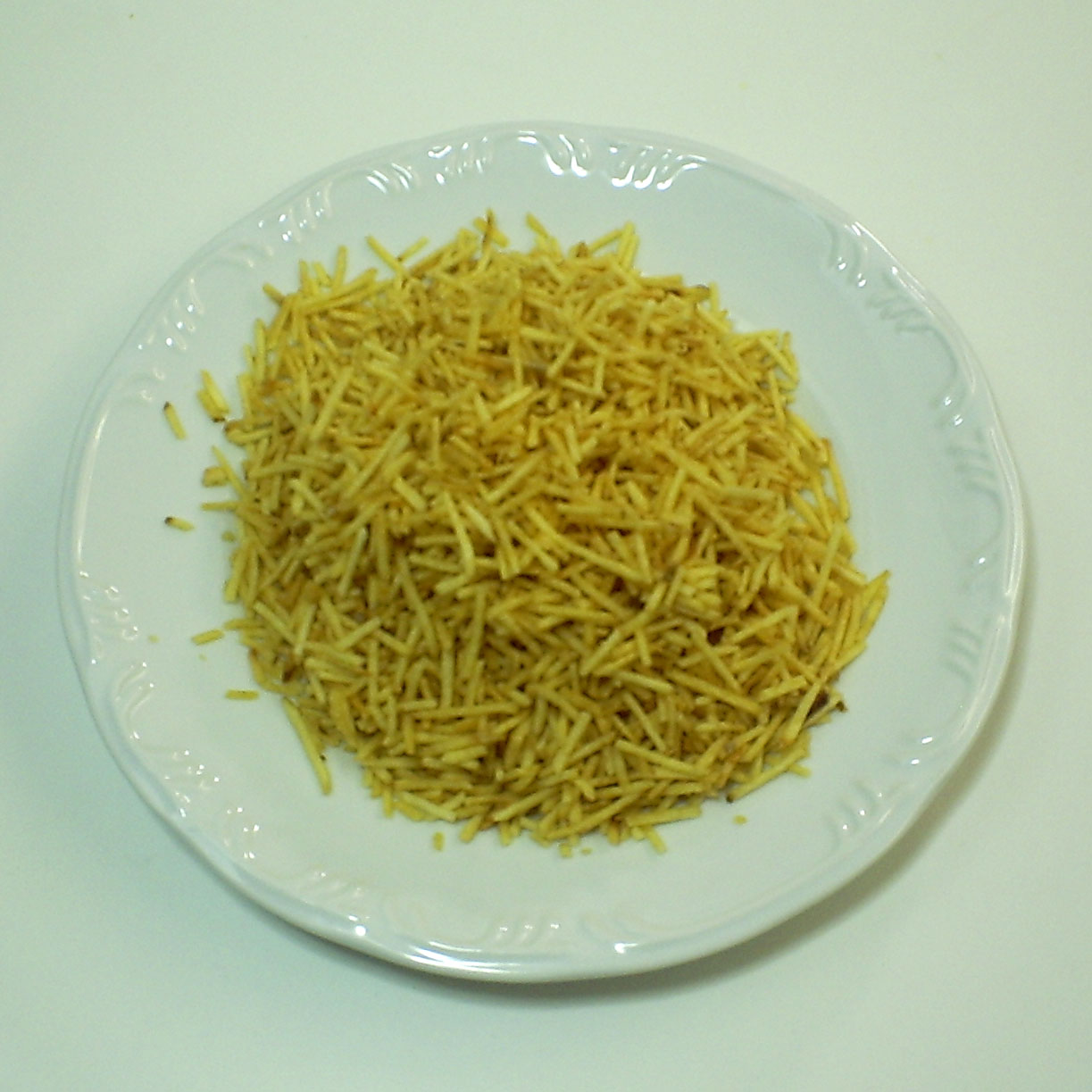 Batata palha (straw potatoes)